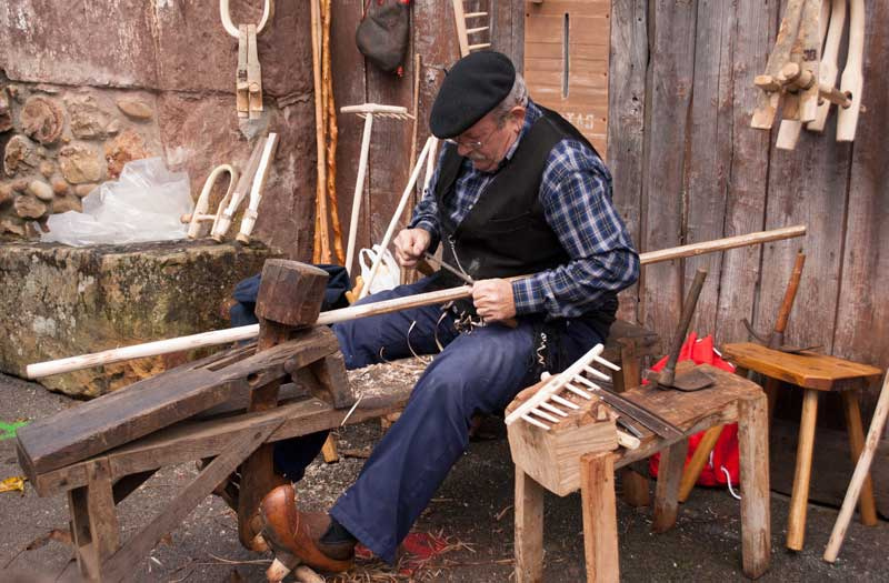 Artesano de la madera realizando un rastrillo para recoger la hierba (Cantabria, España).